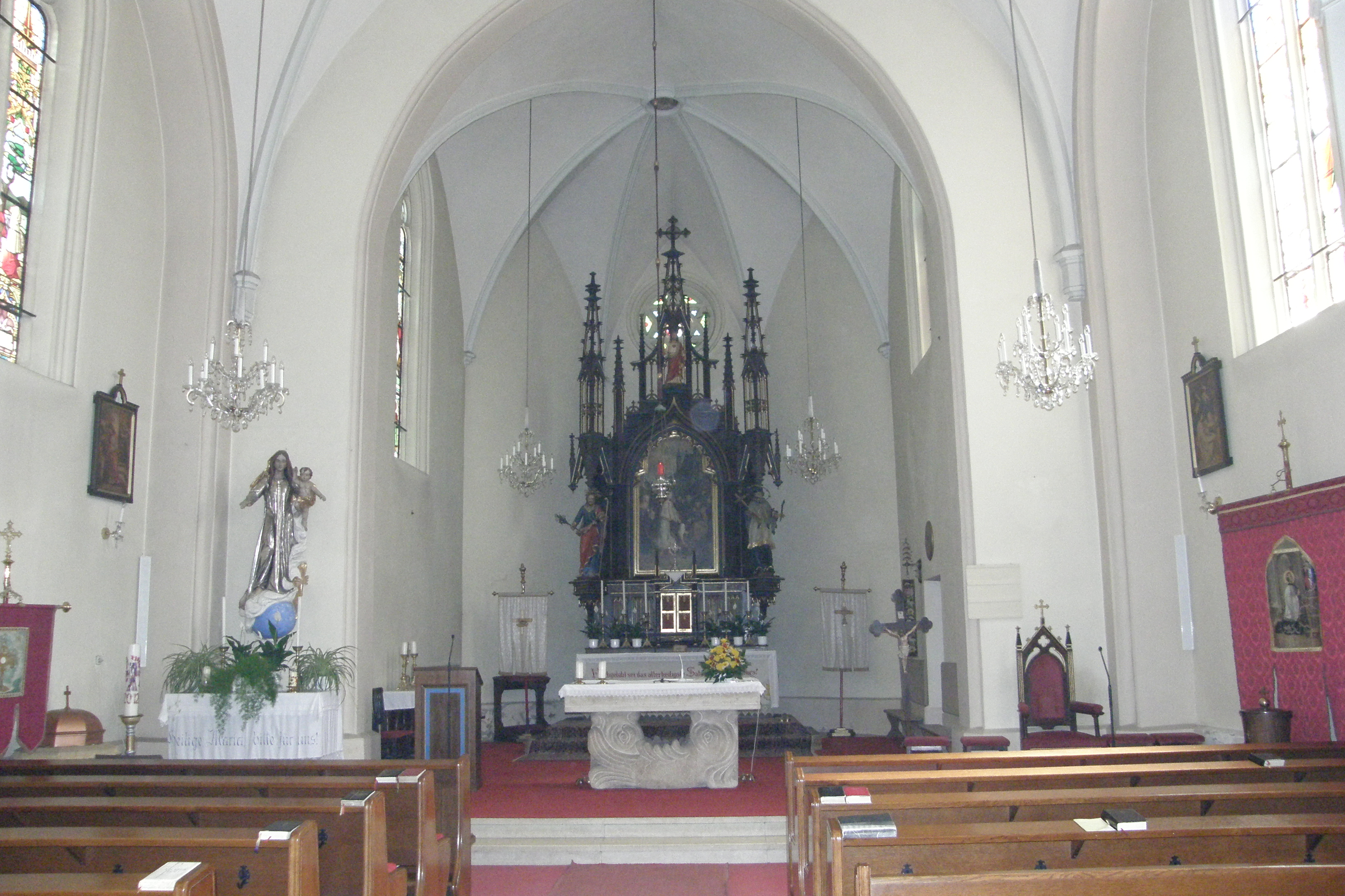 Kath. Pfarrkirche hl. Kundigunde